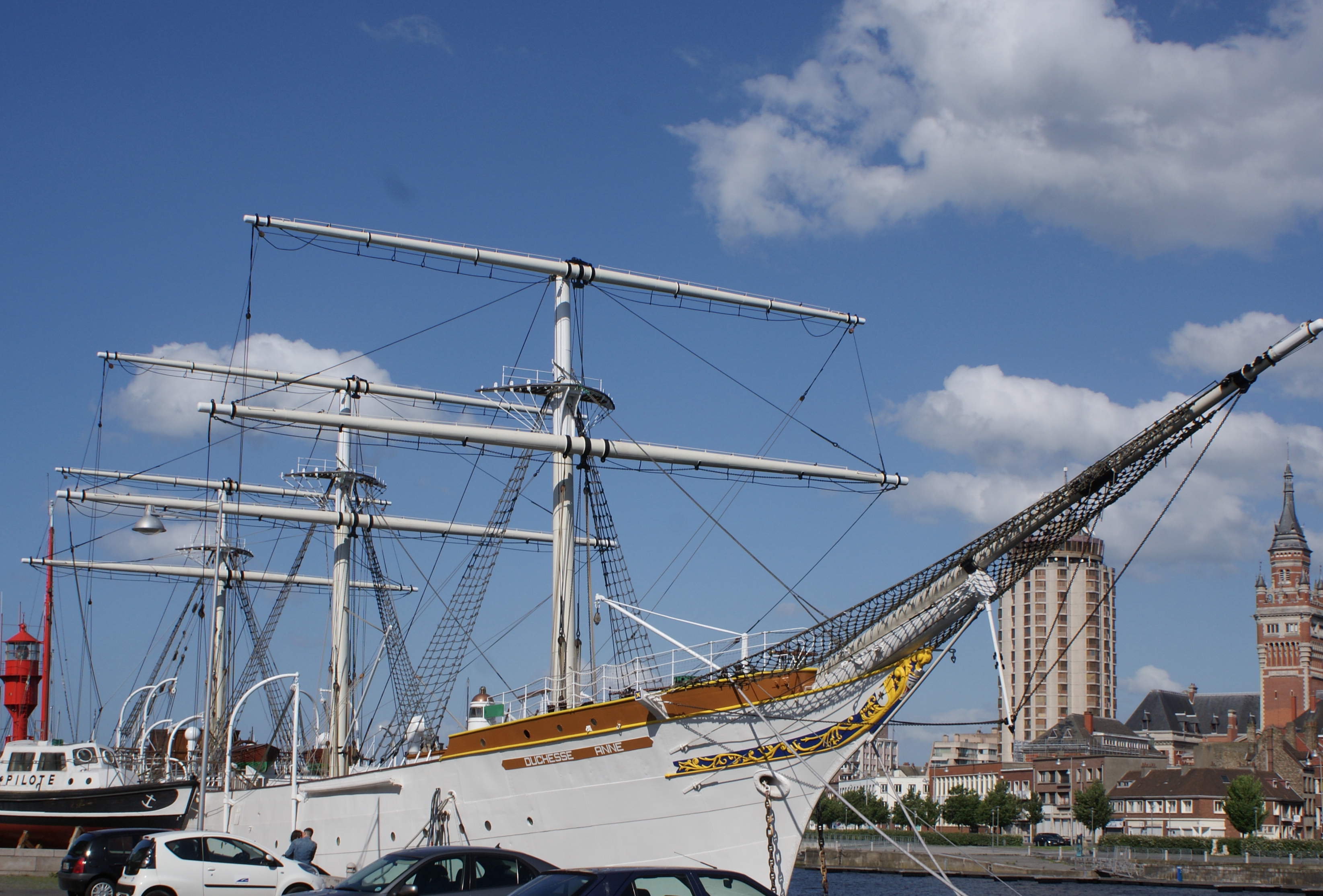 état du Duchesse Anne après son retour de carénage, vergues et mats supérieurs manquants